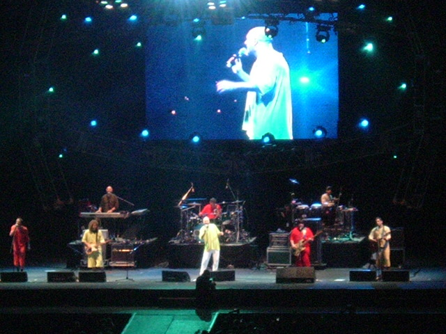 Bersuit Vergarabat. Recital en Ferro. Quilmes Rock 2004.Buenos Aires. Argentina..